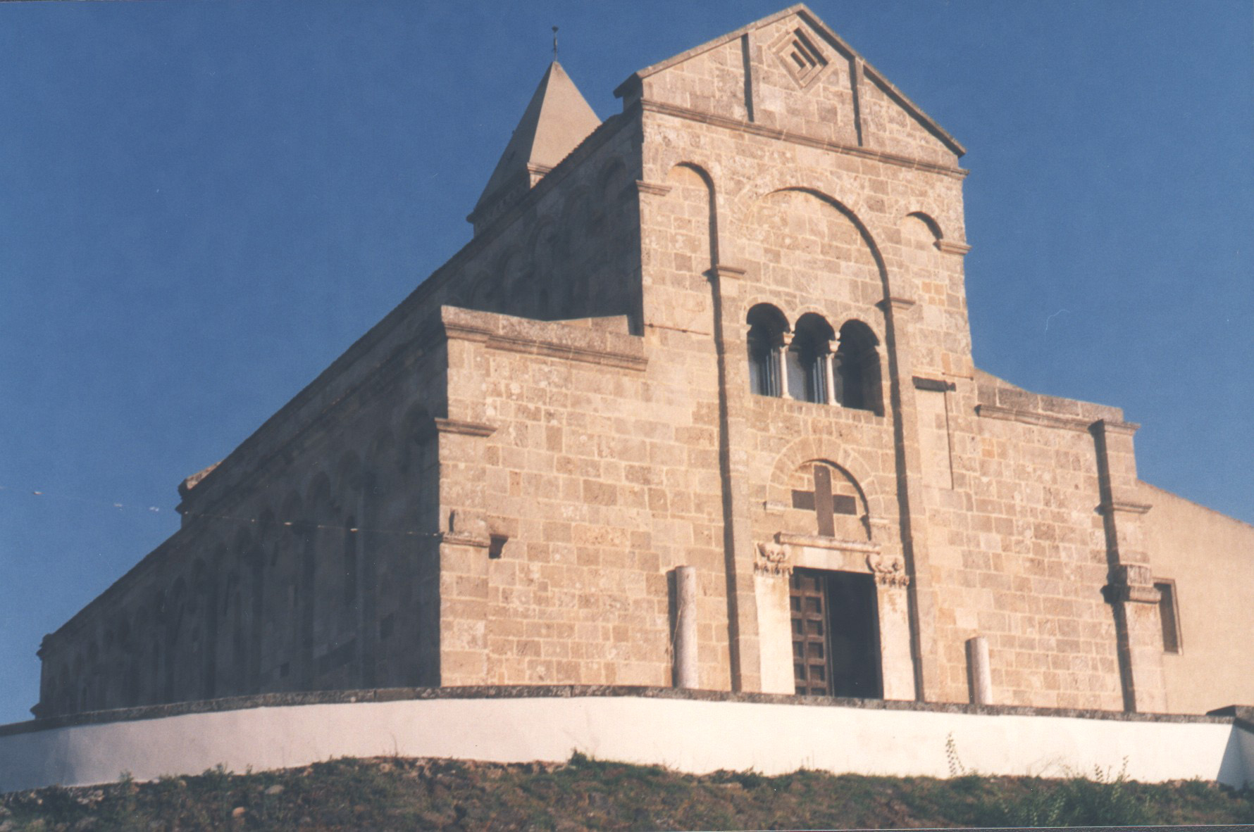 Basilica romanica di Santa Giusta, Santa Giusta (OR), Sardegna